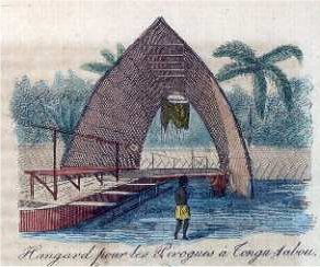 Beschreibung: Unterstand für Pirogen (Schiffe), 1832 Quelle: Lizenz: gemeinfrei, da abgelaufen Kategorie:Bild:Bauwerk